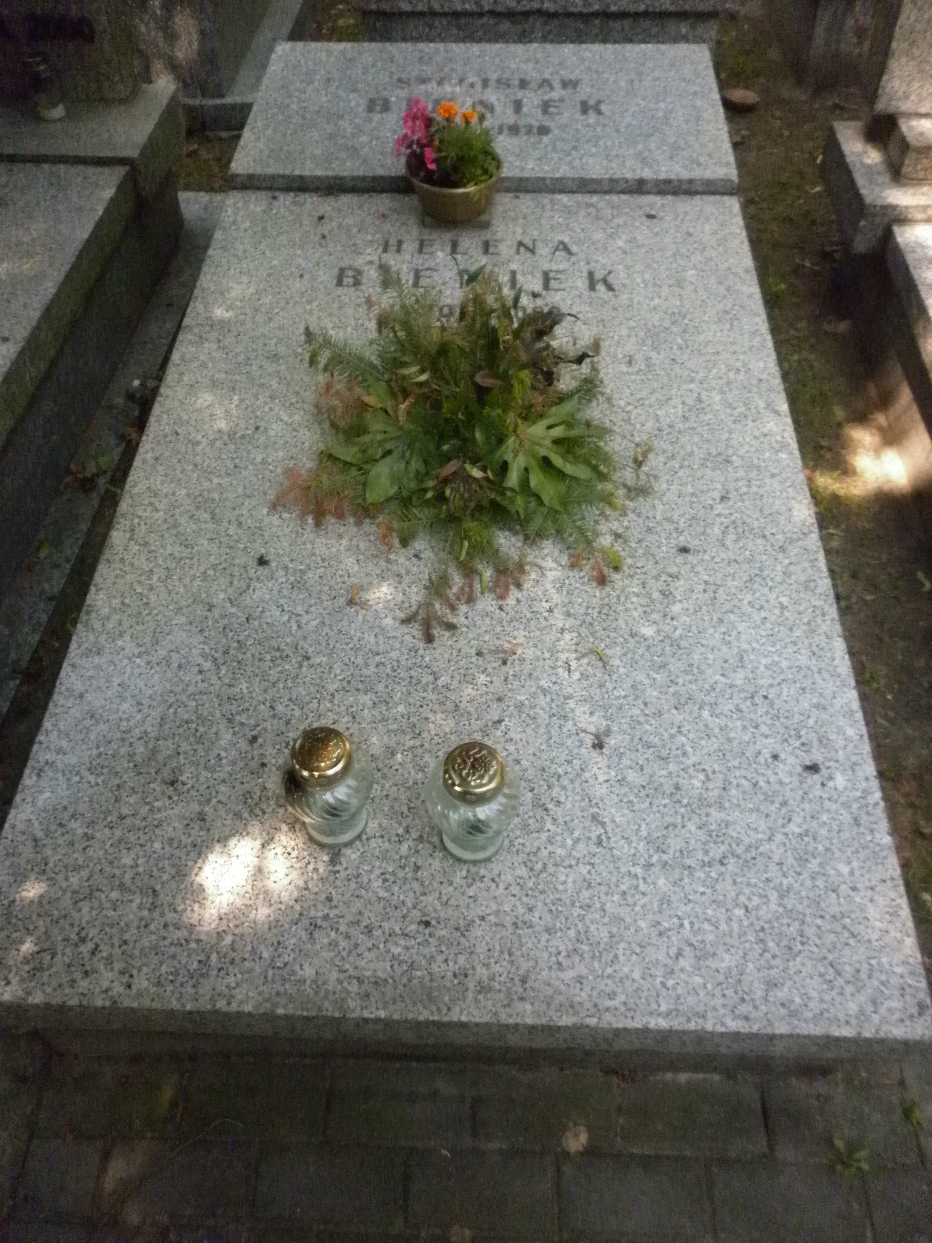 Grób Stanisława Bieńka na Wojskowych Powązkach